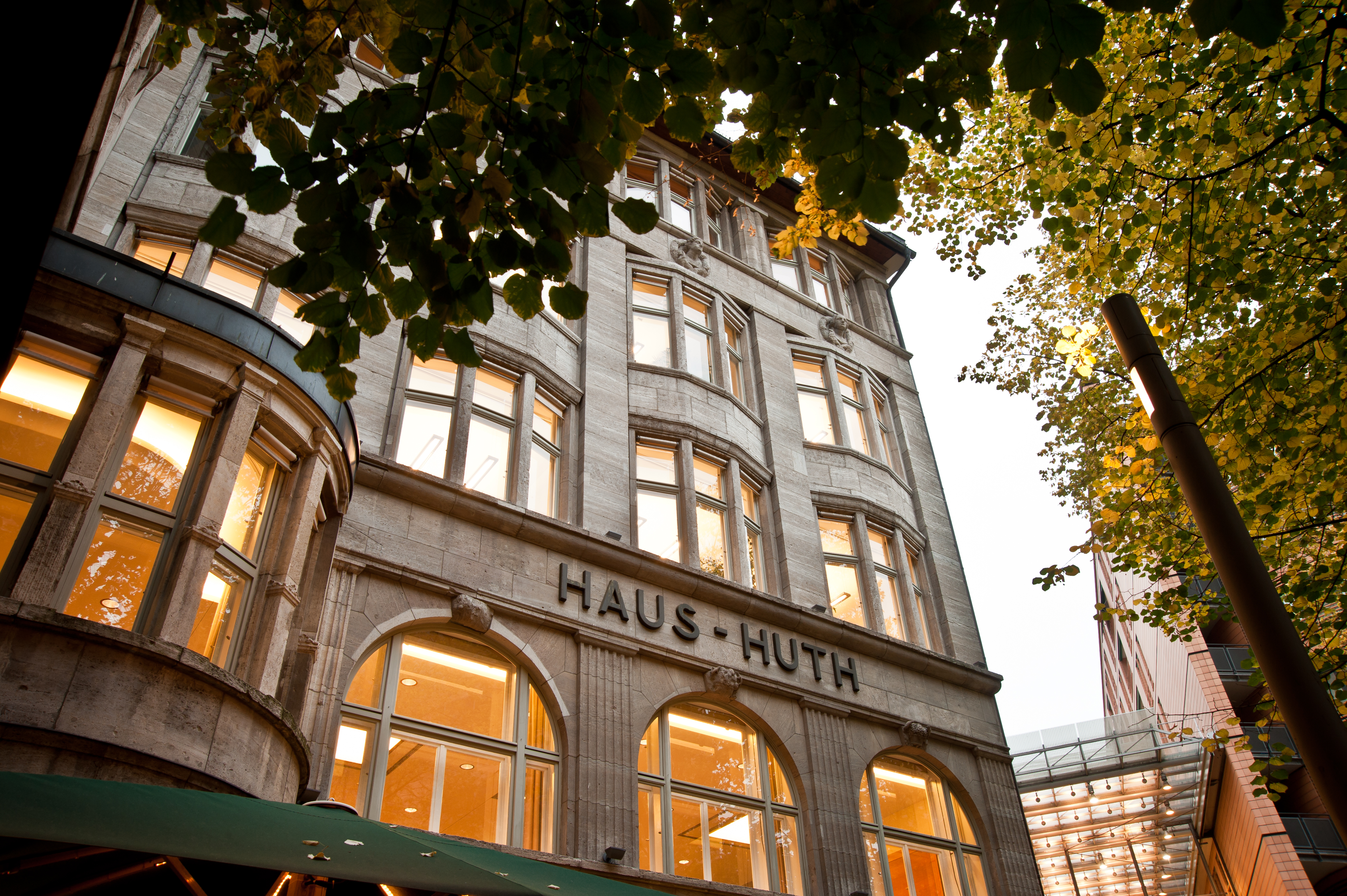 Haus Huth am Berliner Potsdamer Platz